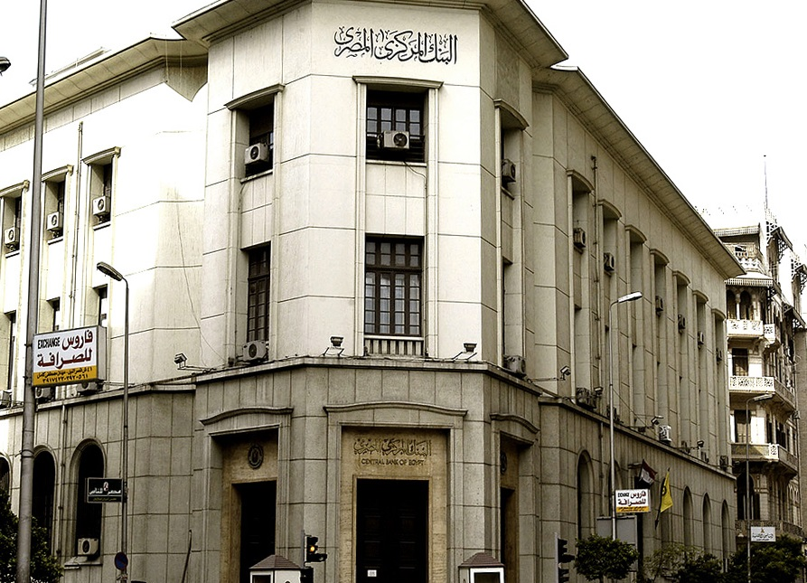 مبني البنك المركزي المصري